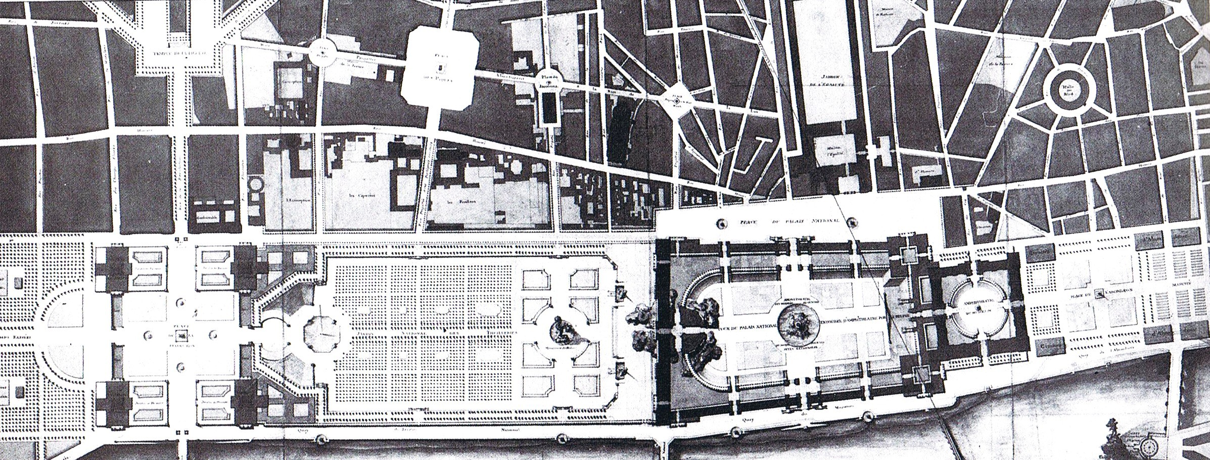 Charles des Wailly, projet d'un Palais National, plan d'ensemble